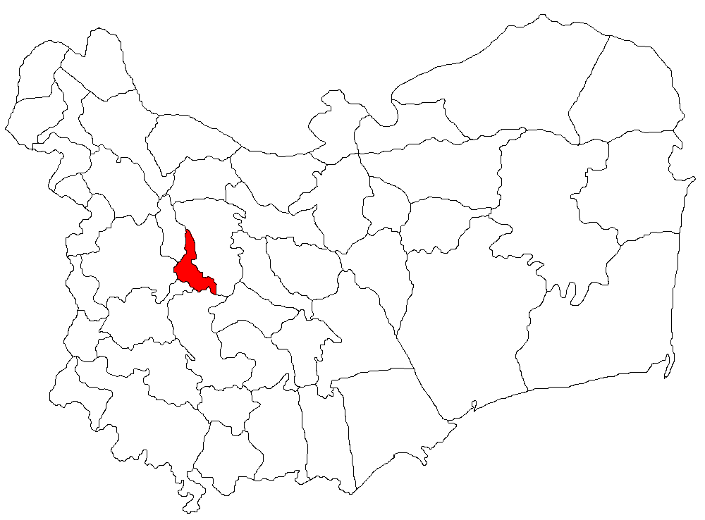 Categorie:Hărţi ale judeţului Tulcea